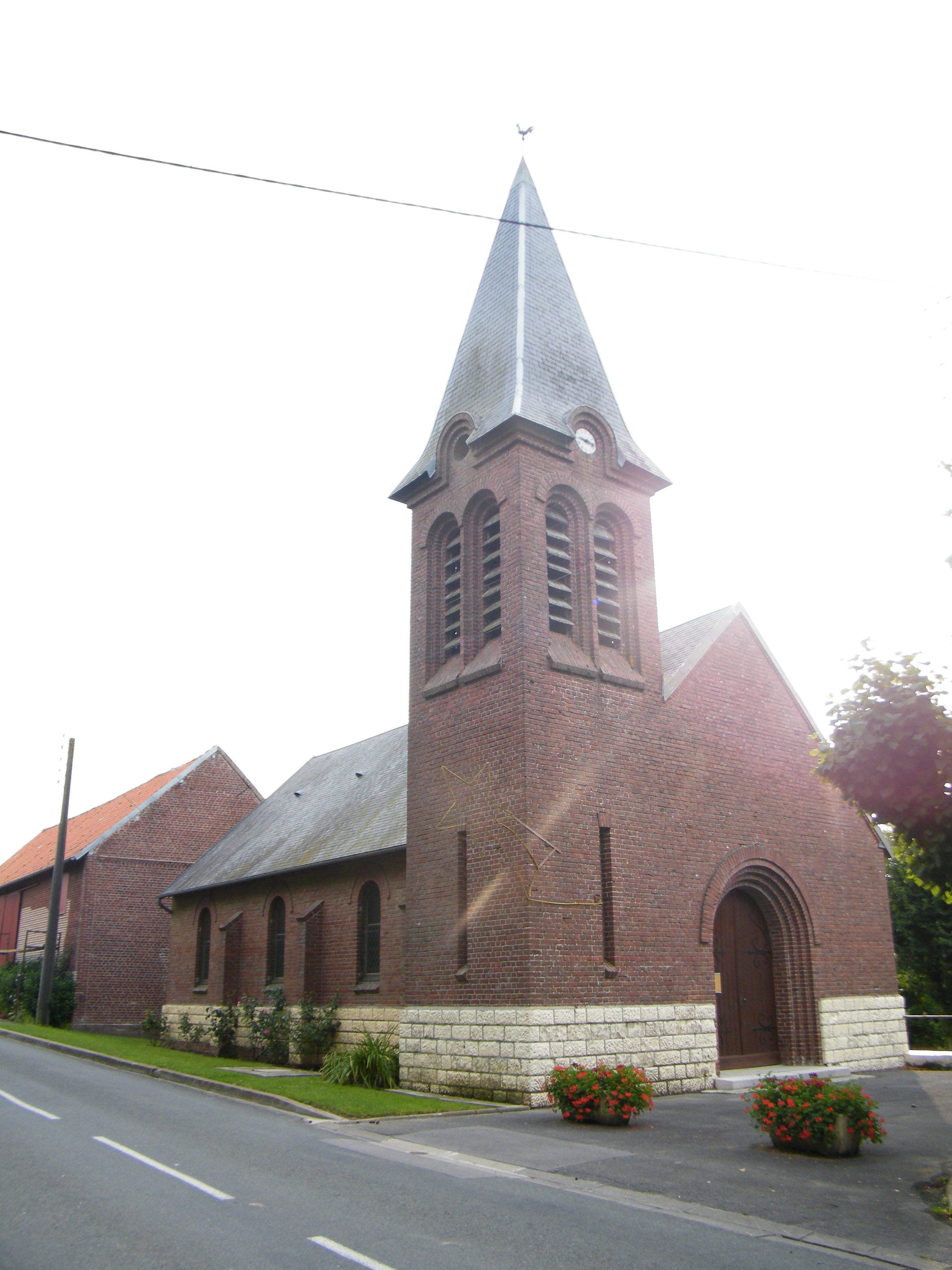 Eglise.